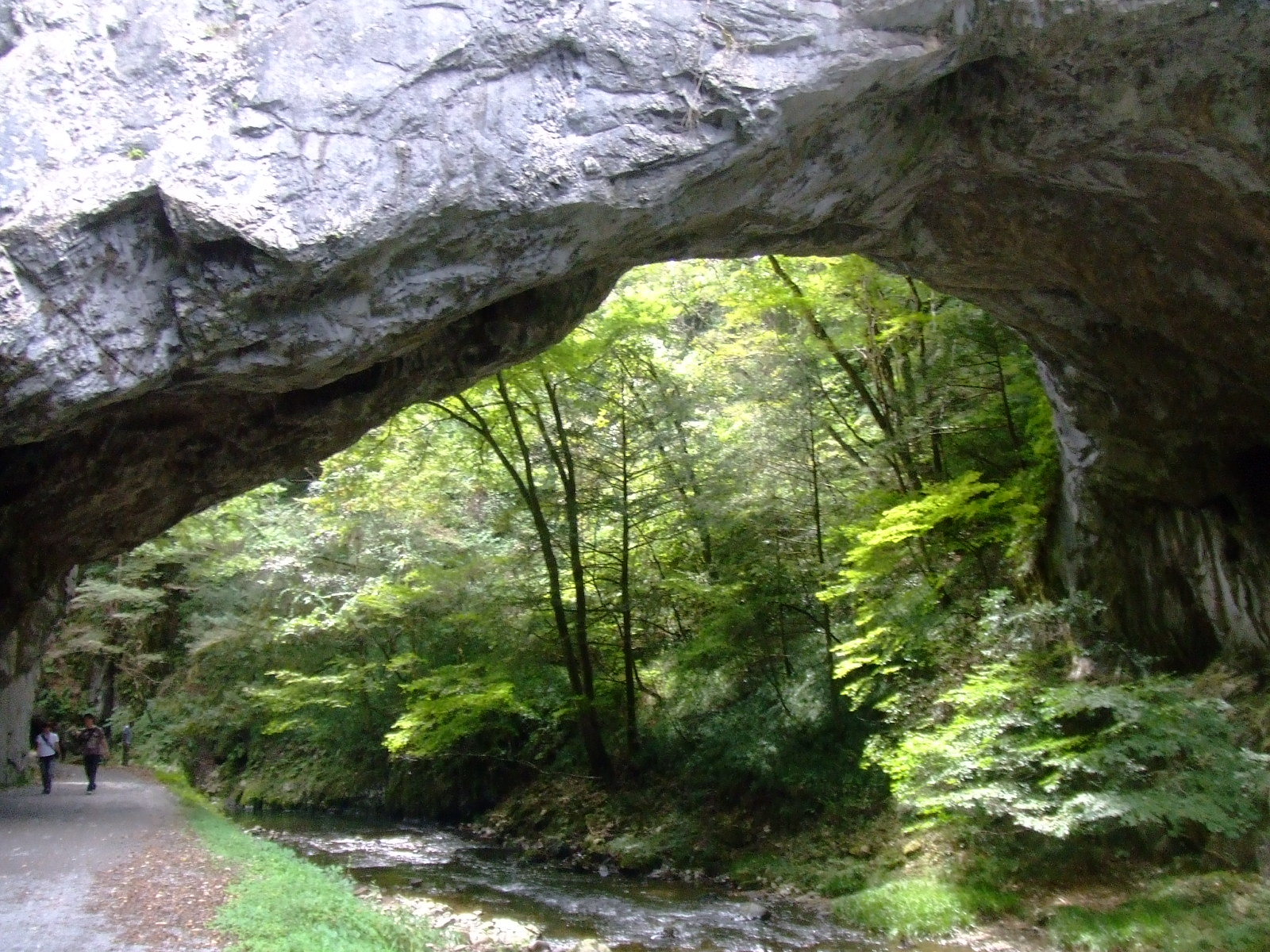 広島県庄原市東城町帝釈、帝釈峡雄橋を帝釈川上流側から望む。